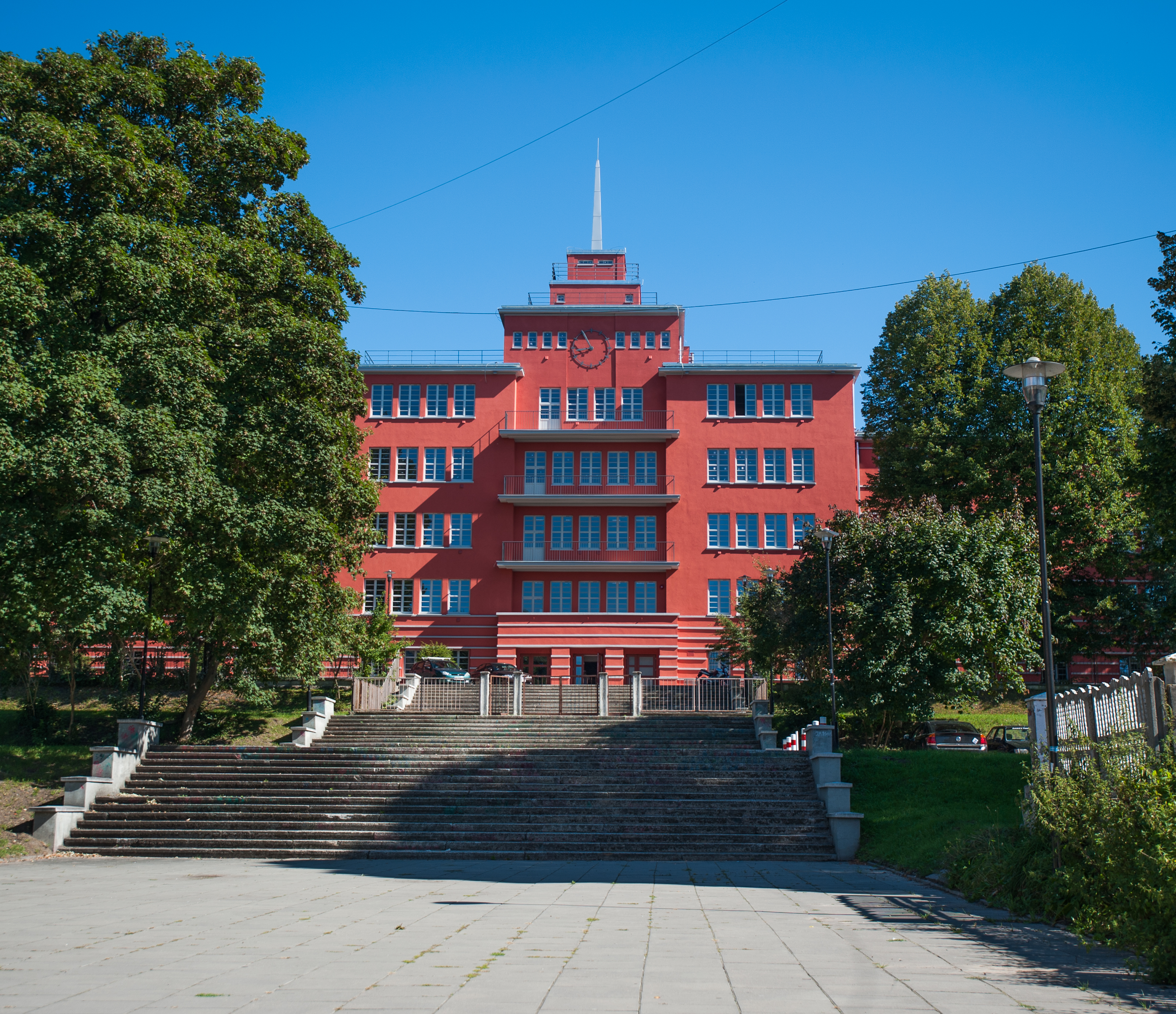 Elbląg, ul. Agrykola 6 - budynek gimnazjum nr 5 (1926-1929) wraz z najbliższym otoczeniem obejmującym działkę 74